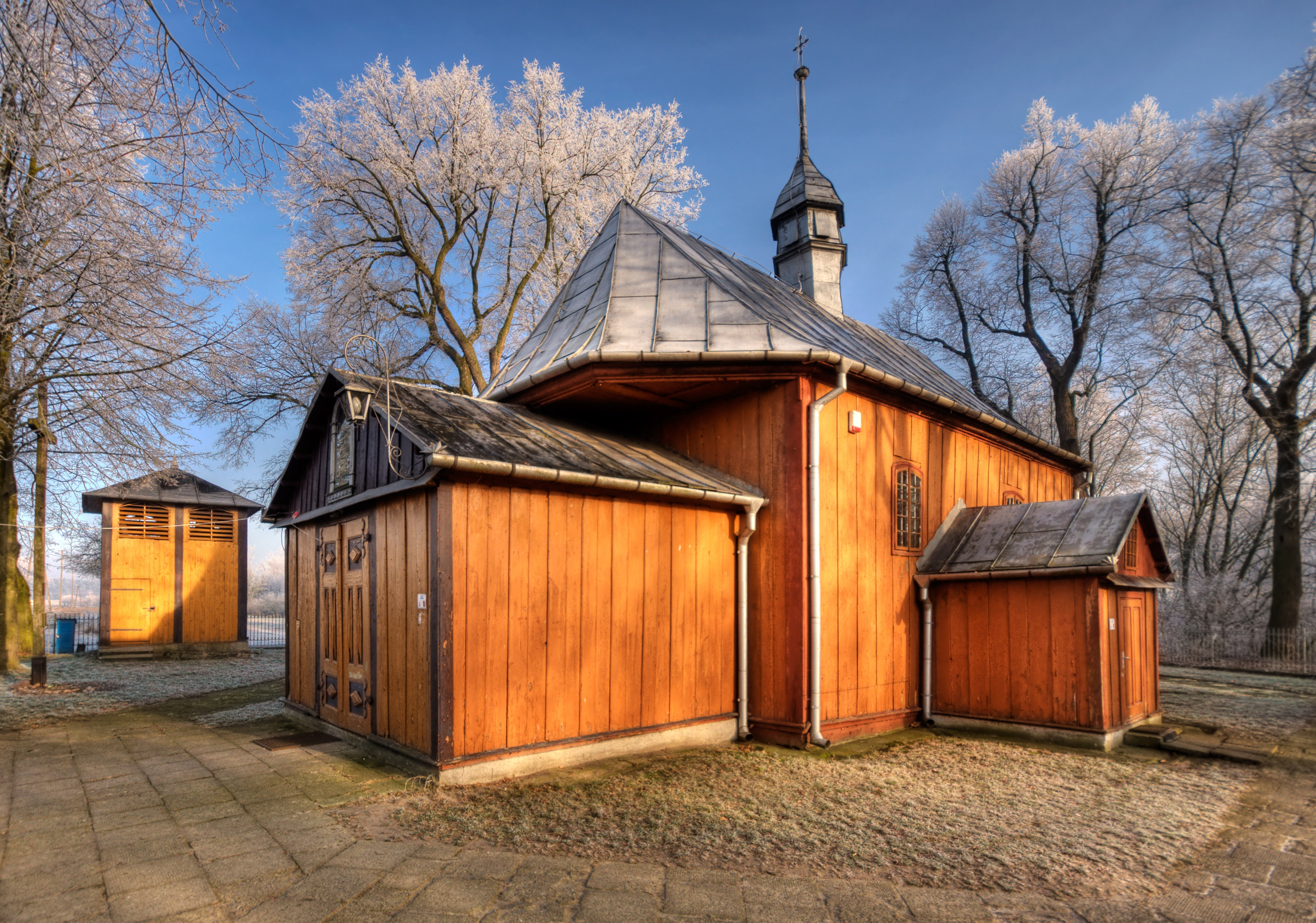 Kościół z XVIII wieku w Brwilnie (gmina Stara Biała)